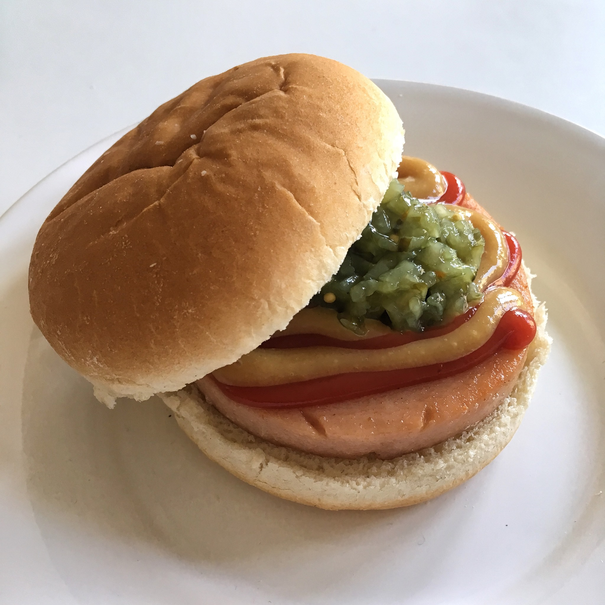 Vanliga tillbehör till parisare är senap, ketchup och bostongurka.